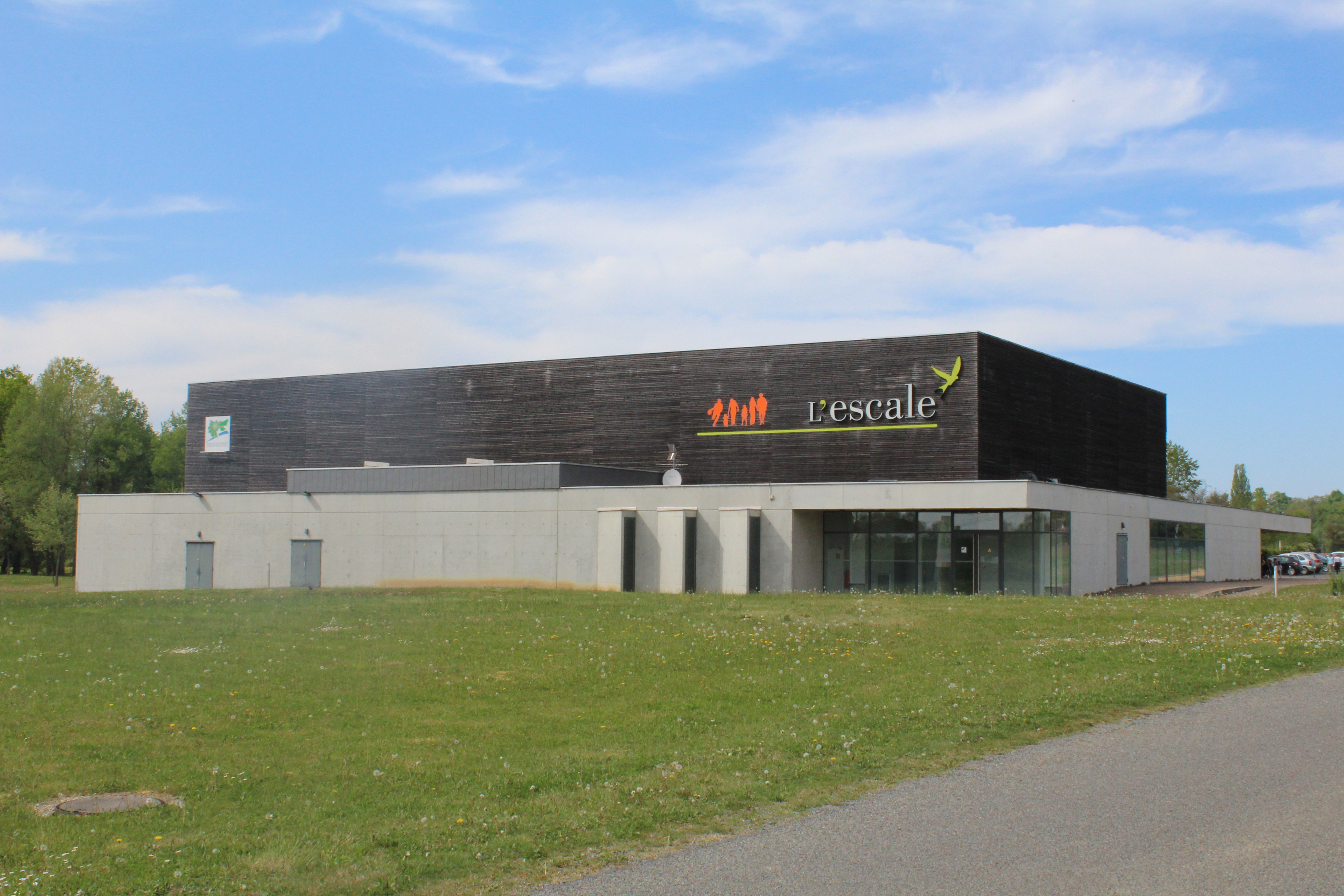 L'Escale, complexe sportif et culturel situé à Saint-Jean-sur-Veyle